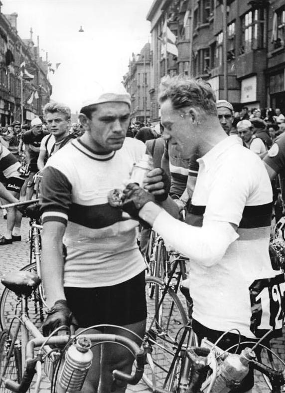 VIII. Friedensfahrt, Schur, Werschinin Zentralbild Kronfeld Bey-Ku 8.5.1955 - VIII. Internationale Friedensfahrt Prag-Berlin-Warschau 1955 - 5. Etappe von Tabor nach Karlovy Vary über 215 km. UBz: Schur (DDR) und Werschinin (UdSSR) sind gute Freunde geworden, wenn sie im Kampf gegenseitig auch hart um den Sieg kämpfen.